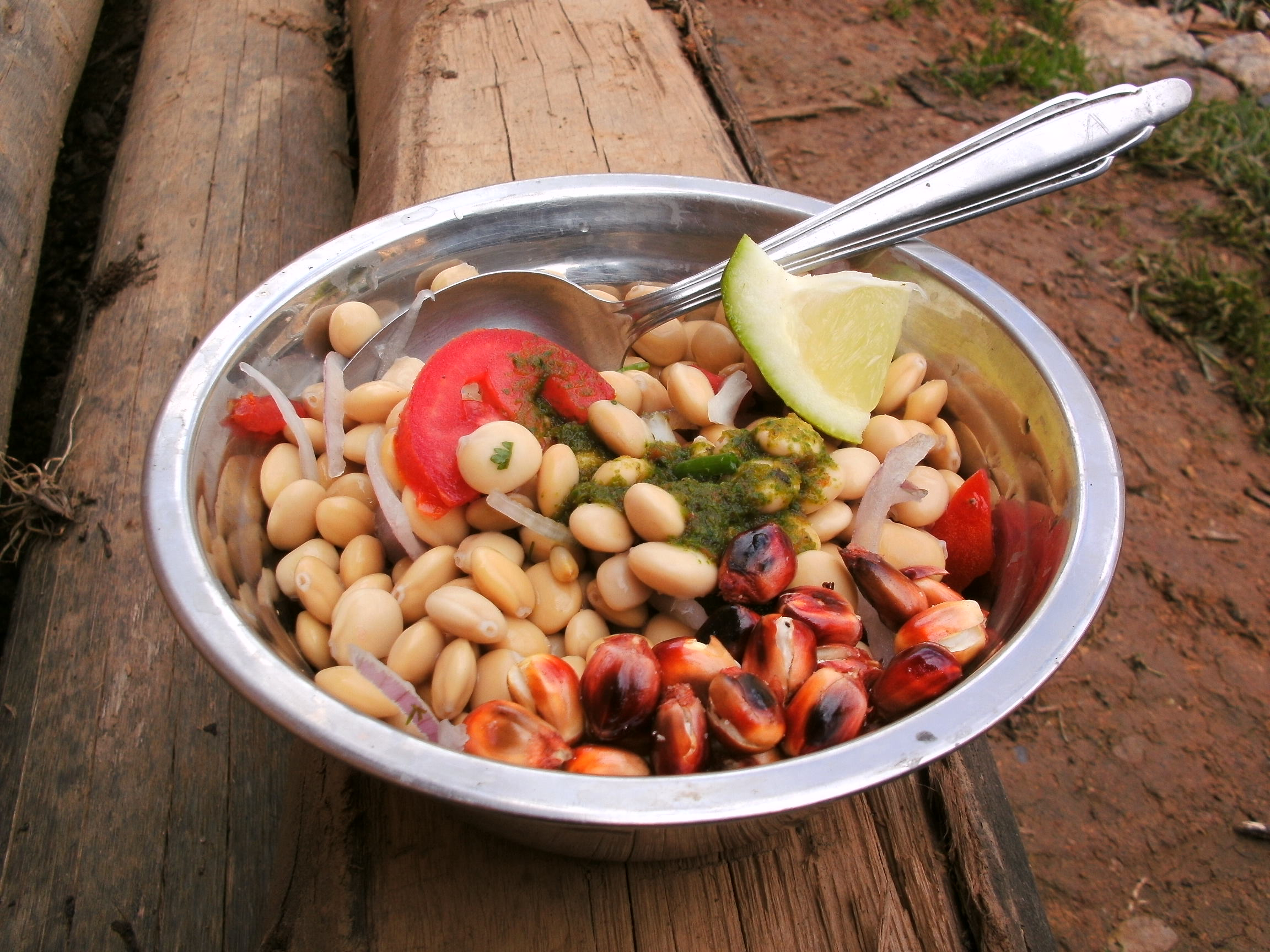 Comida típica del tarwi muy popular y nutritiva en todos los pueblos de la Sierra Oriental de Áncash.